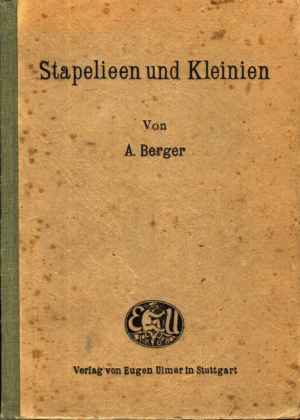 Buchtitel "Stapelieen und Kleinien" von Alwin Berger